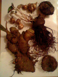 Gomoljnice Eta